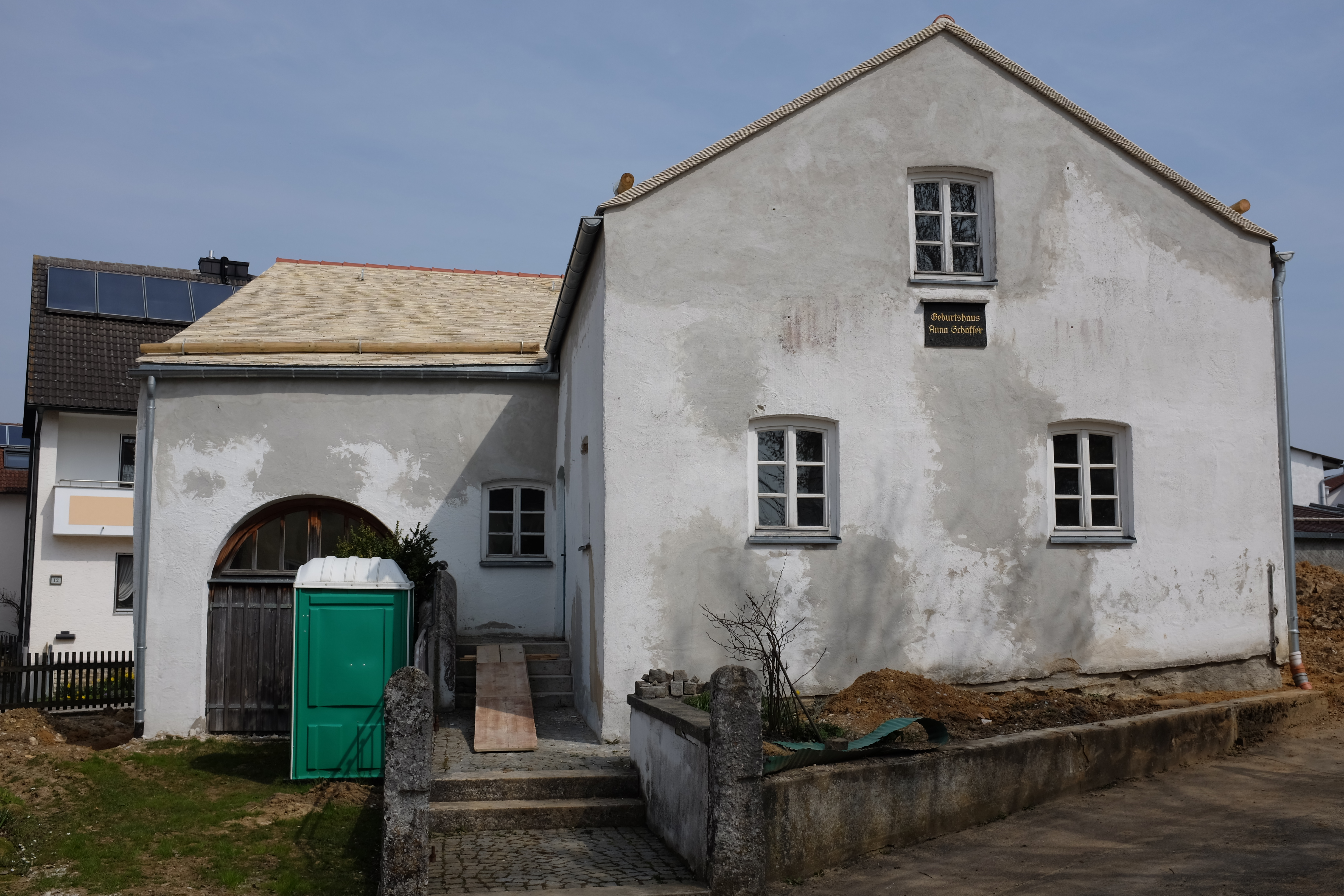 Geburtshaus von Anna Schäffer in Mindelstetten.